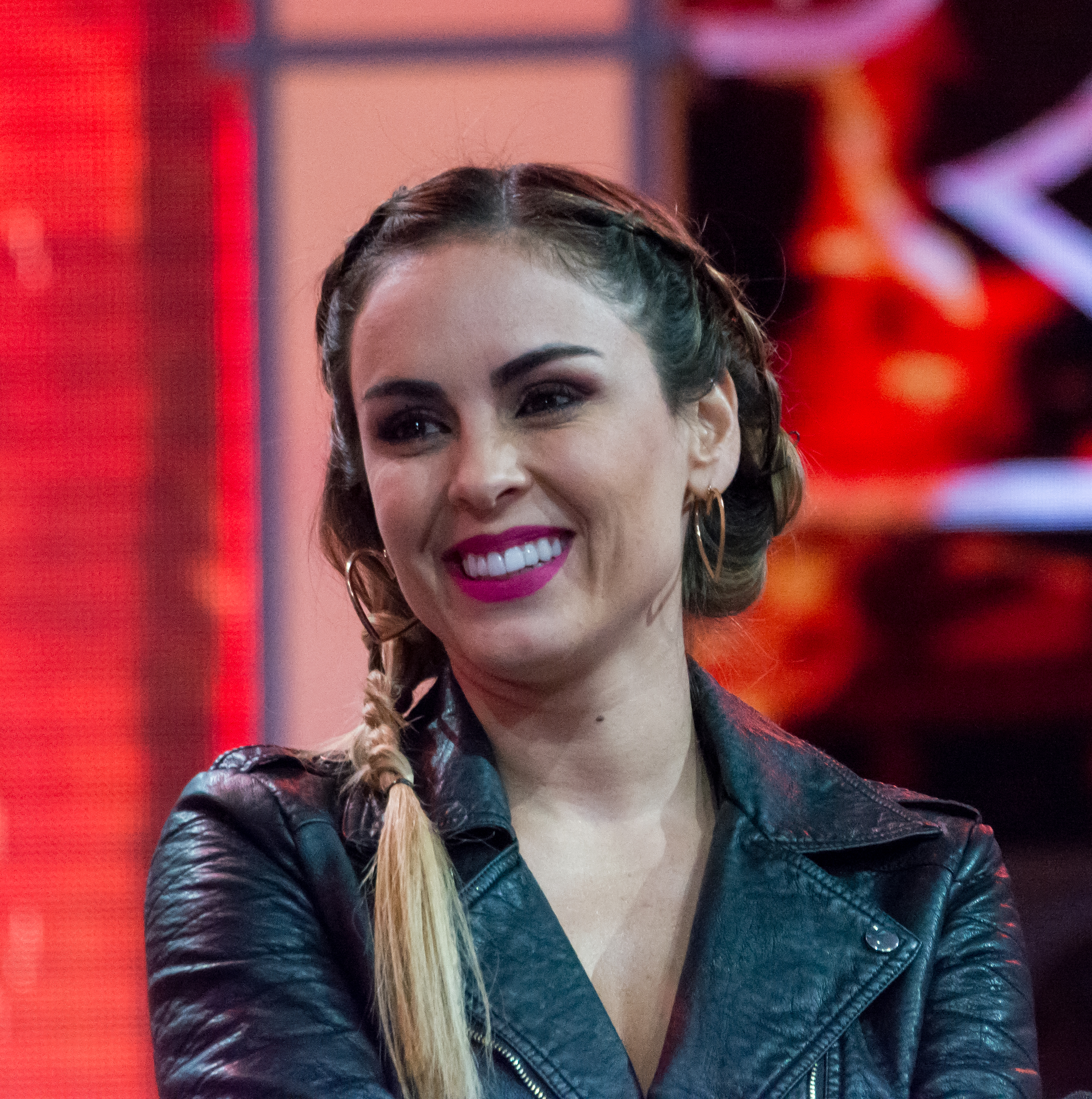 Maura Rivera, Rojo, Televisión Nacional de Chile, Santiago, Chile.